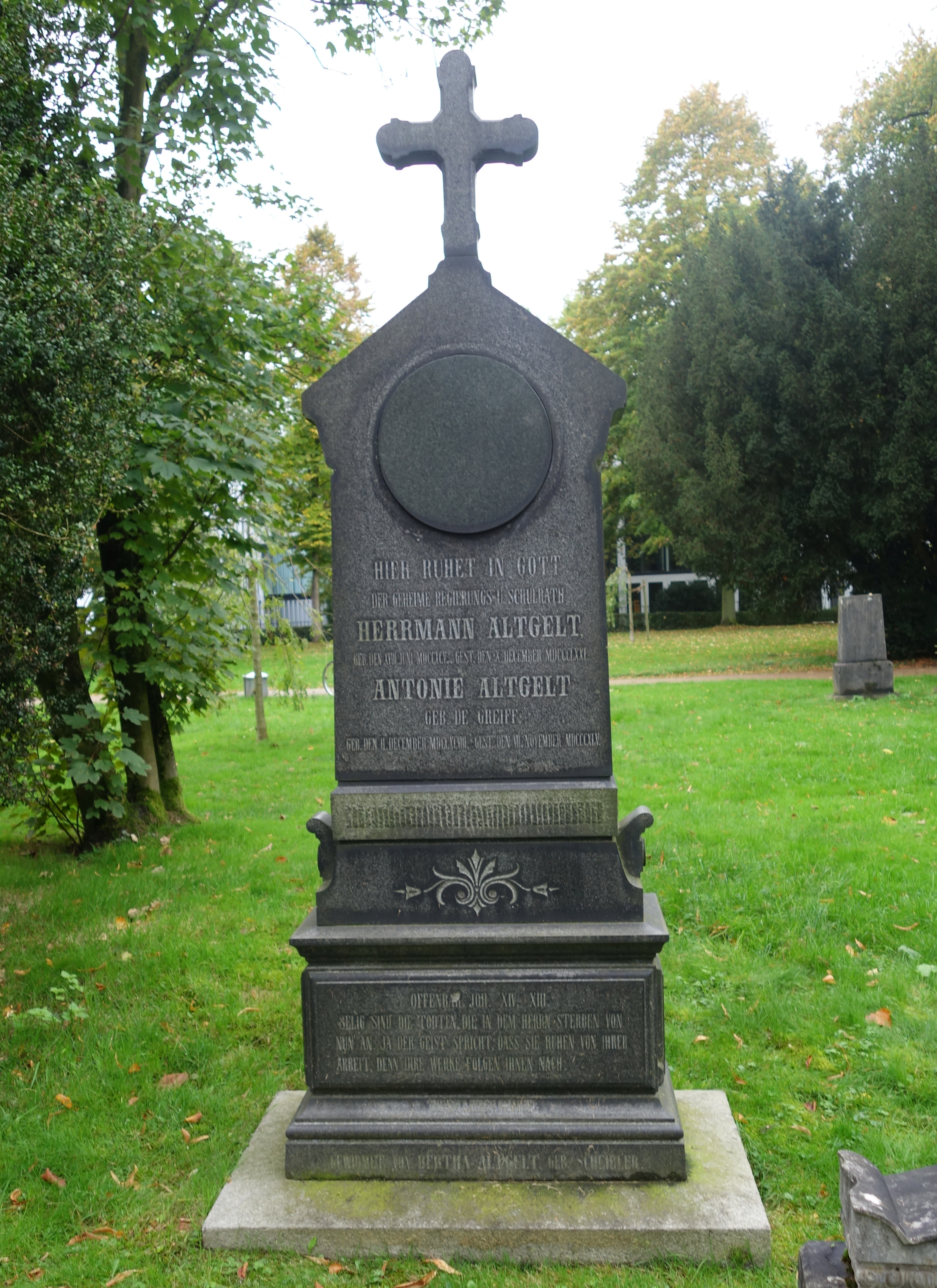 Golzheimer Friedhof, Düsseldorf, Grabmal Herrmann und Antonie Altgelt.